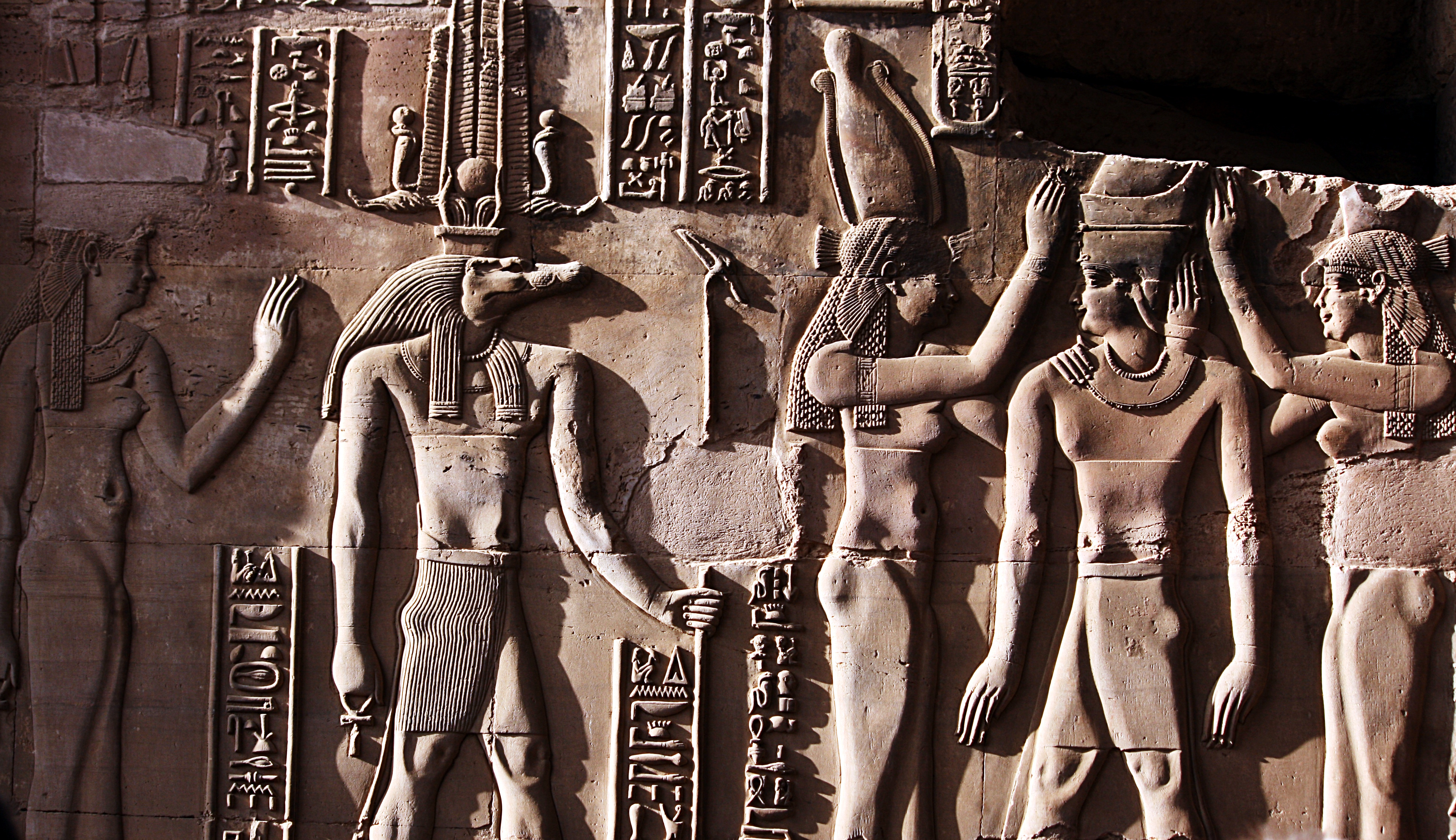 Tempel von Kom Ombo: Relief des Krokodilgottes Sobek